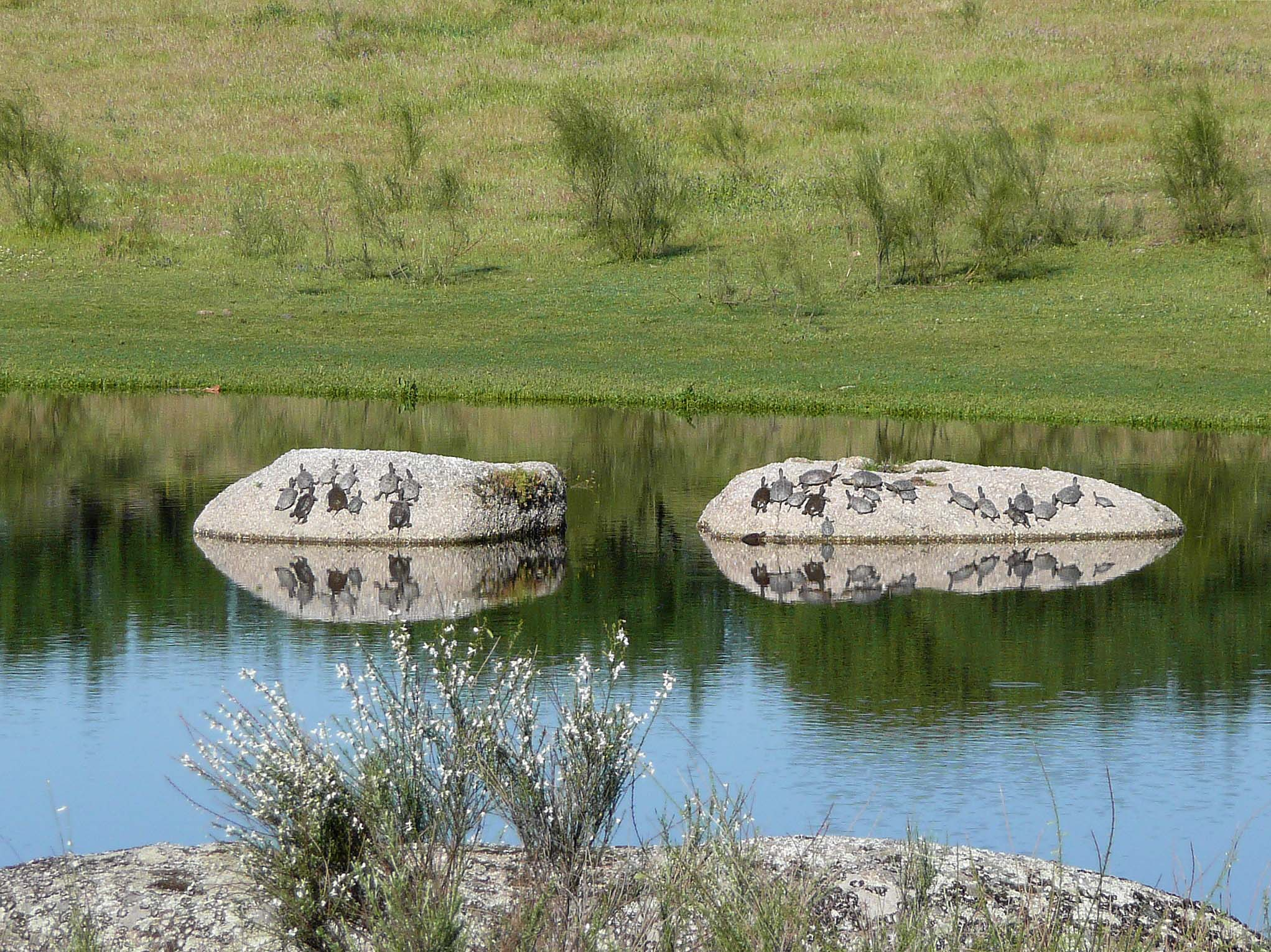 Galápagos leprosos en Los Barruecos